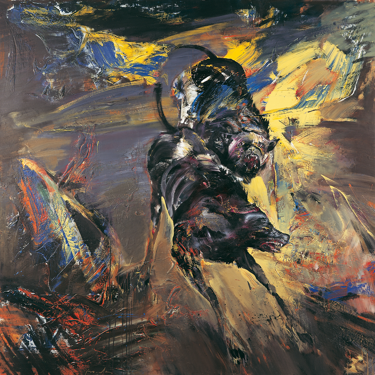 Franta, Zuřivost (1995), olej na plátně 200 x 200 cm